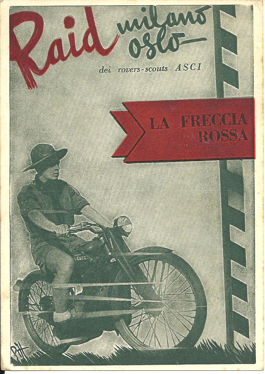 La cartolina distribuita come ricordo del Raid Milano-Oslo